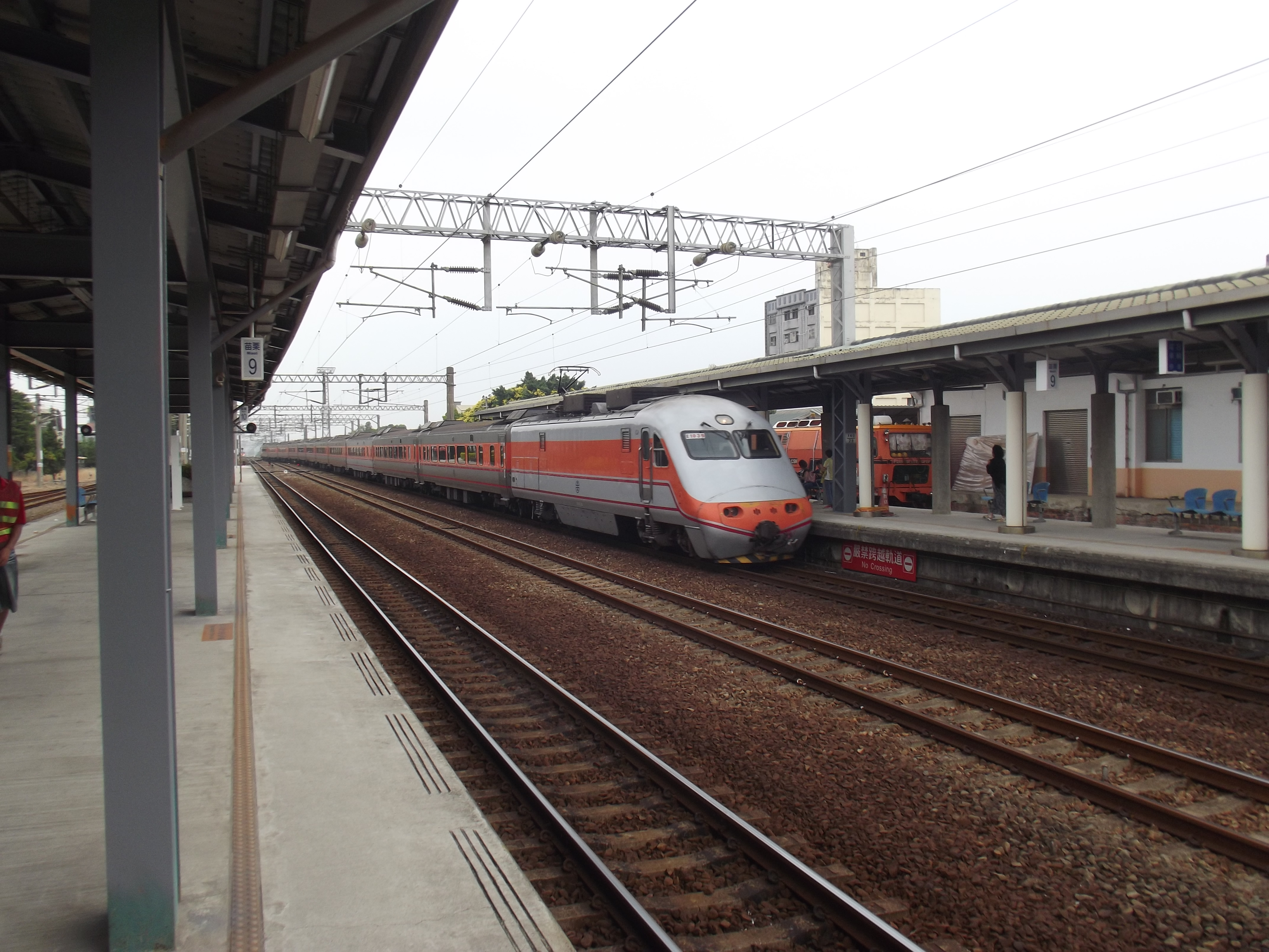 Getrokken Trein E1039 in Miaoli Station.